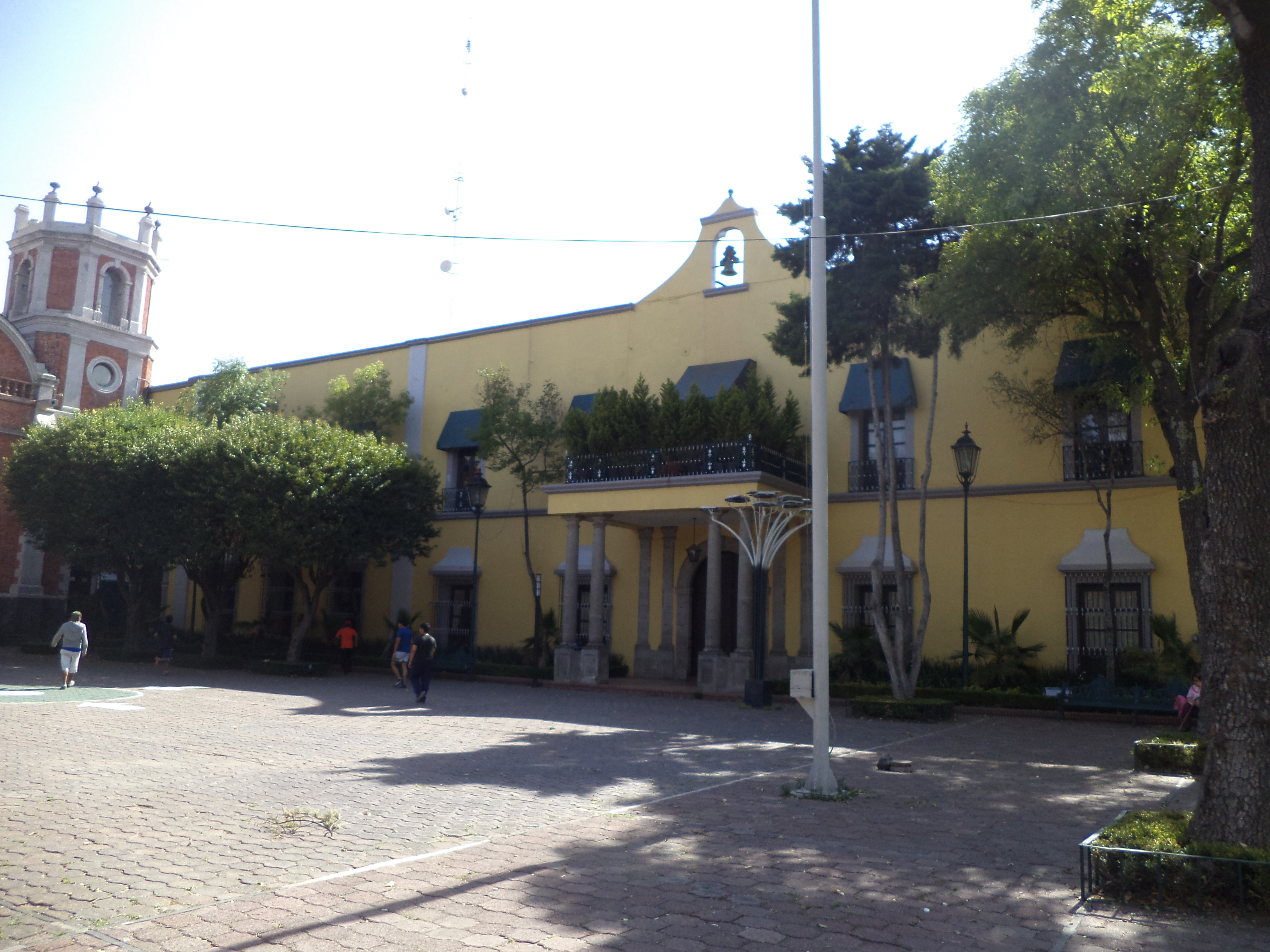 Edificio de la delegacion Miguel Hidalgo